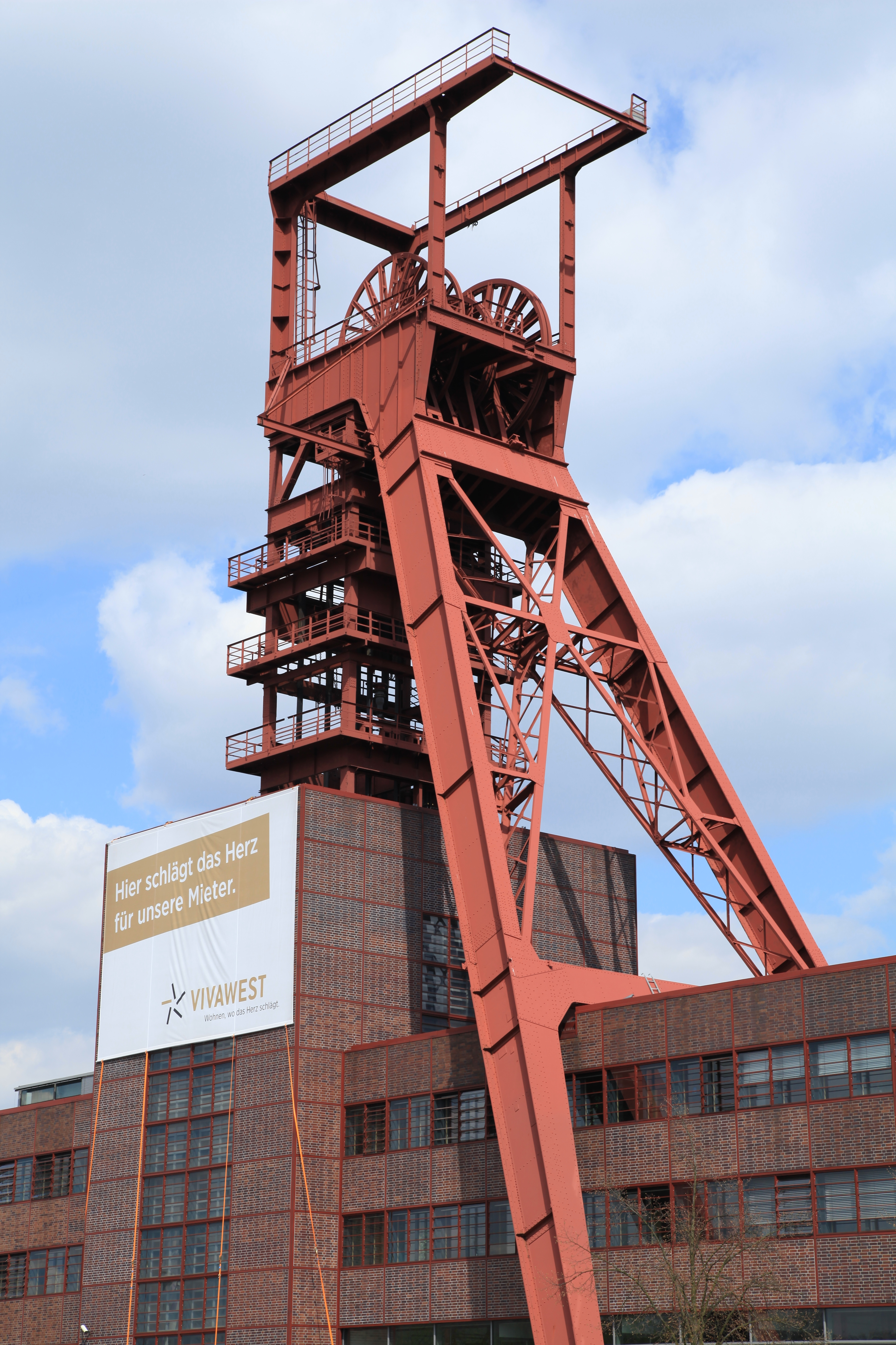 Schacht 1 von Zeche Nordstern im Nordsternpark in Gelsenkirchen